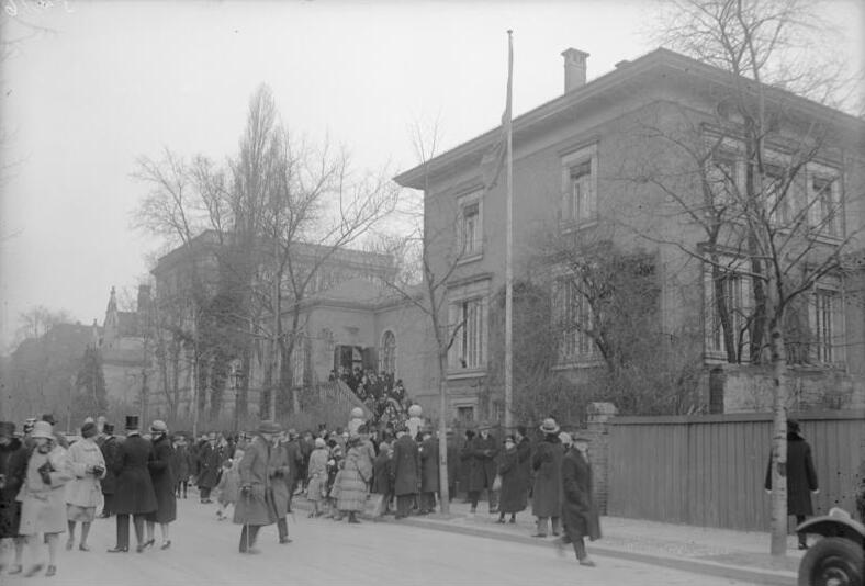 Der König von Schweden in Berlin! Die schwedische Kirche in Wilmersdorf in welcher der König von Schweden dem Gottesdienst beiwohnte.